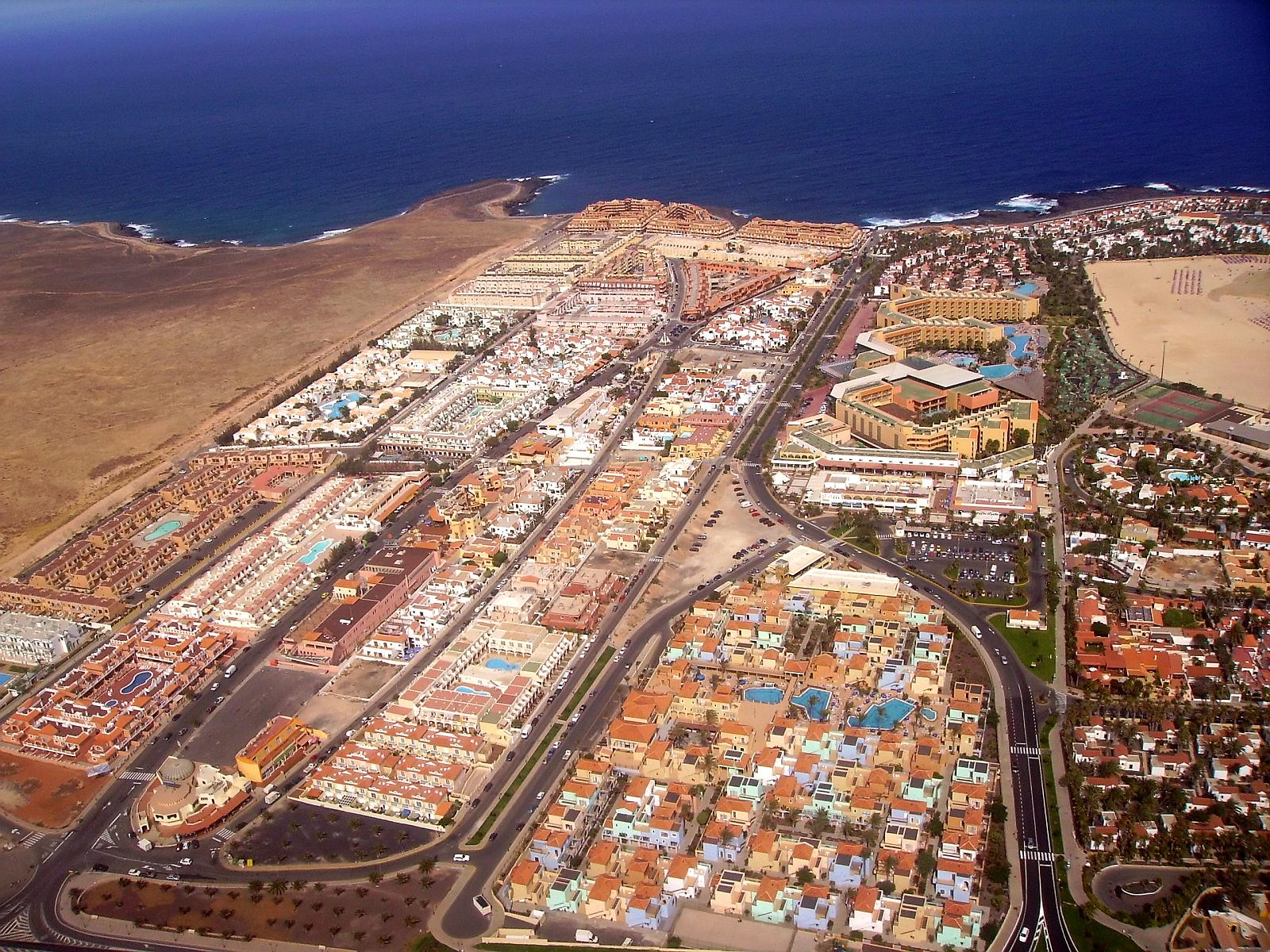 Caleta de Fuste, Fuerteventura. Aerial photograph.